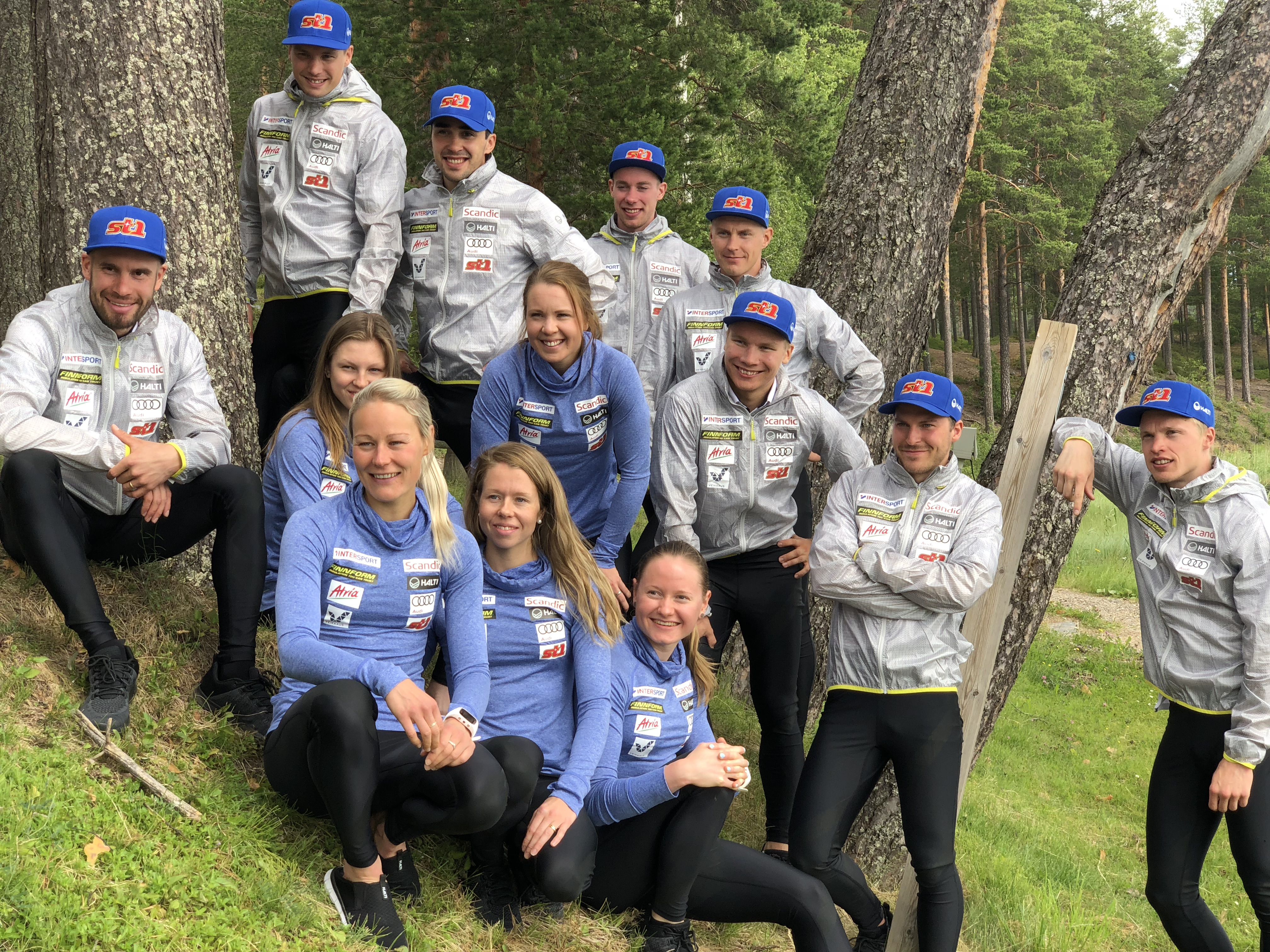 Suomen maastohiihtomaajoukkue Vuokatissa 2018